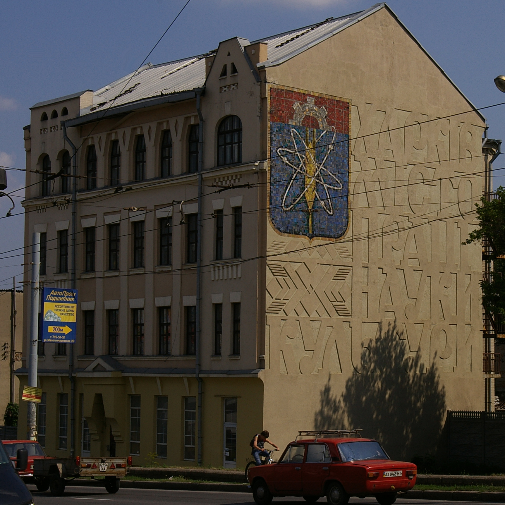 Харьков